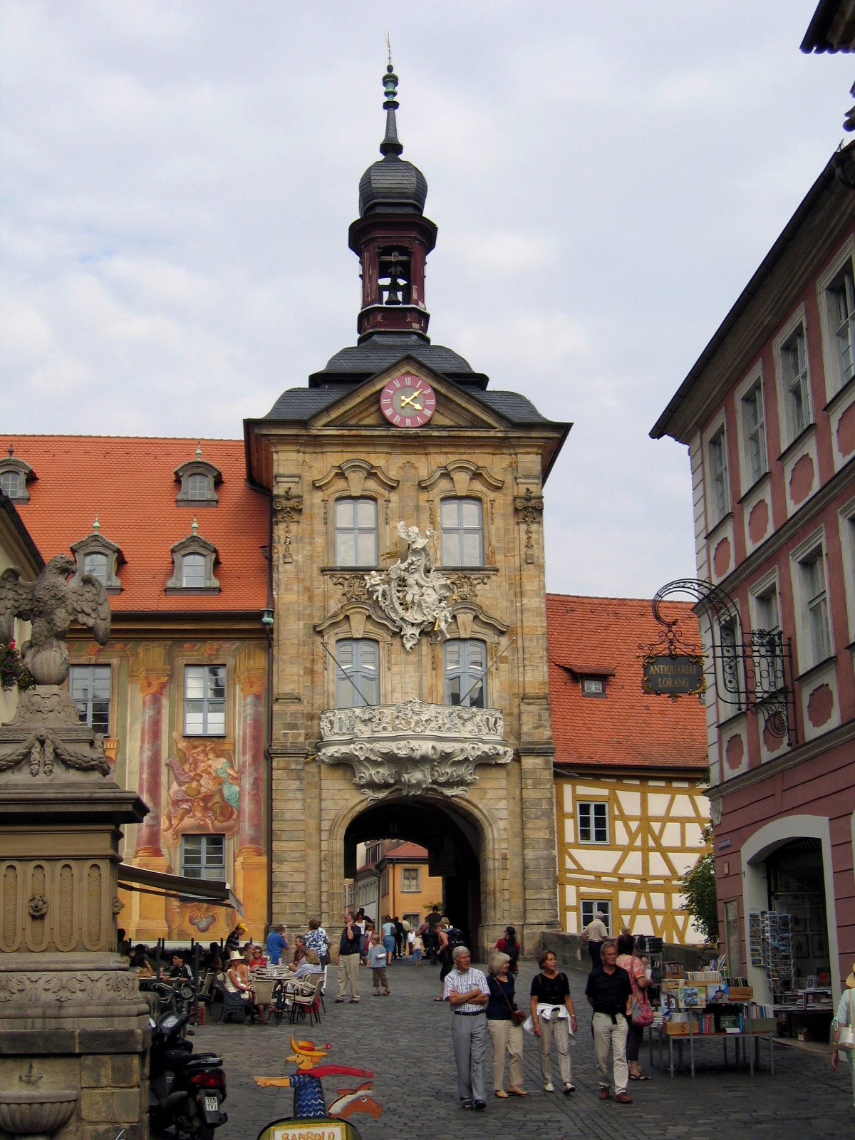 "Altes Rathaus", auf einer Insel im linken Regnitzarm in Bamberg, Deutschland.